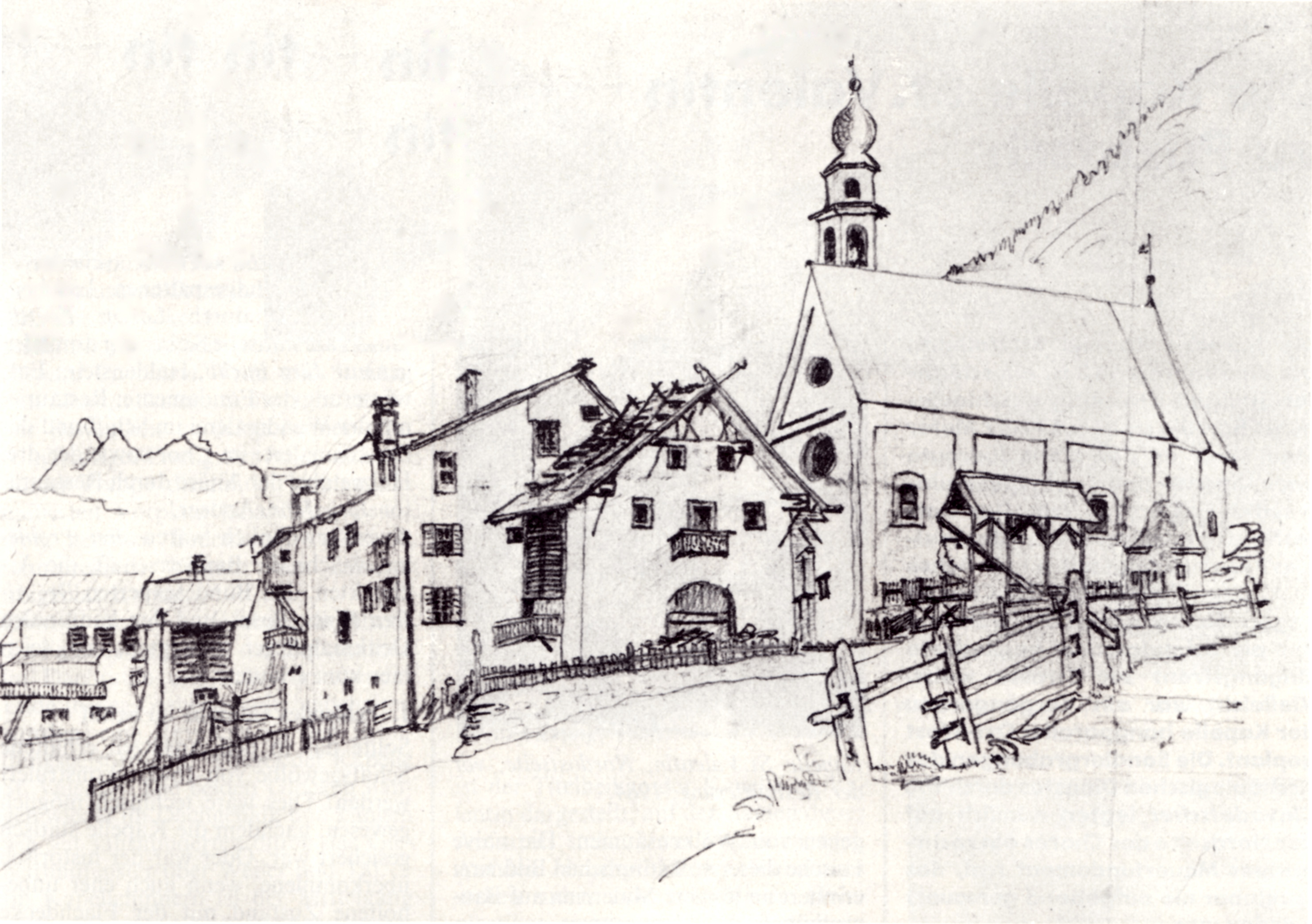 Pontresina, der Gründungsbau des Hotels Saratz vor 1865